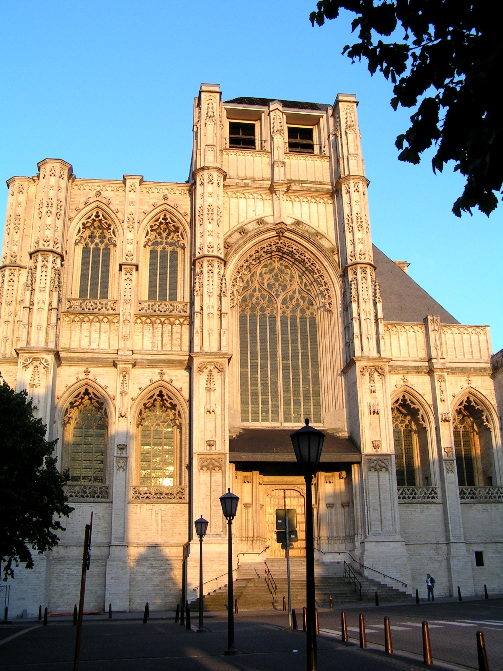 Sint Pieter Church, Leuven, Belgium. Picture by Athenchen (22nd June, 2006).